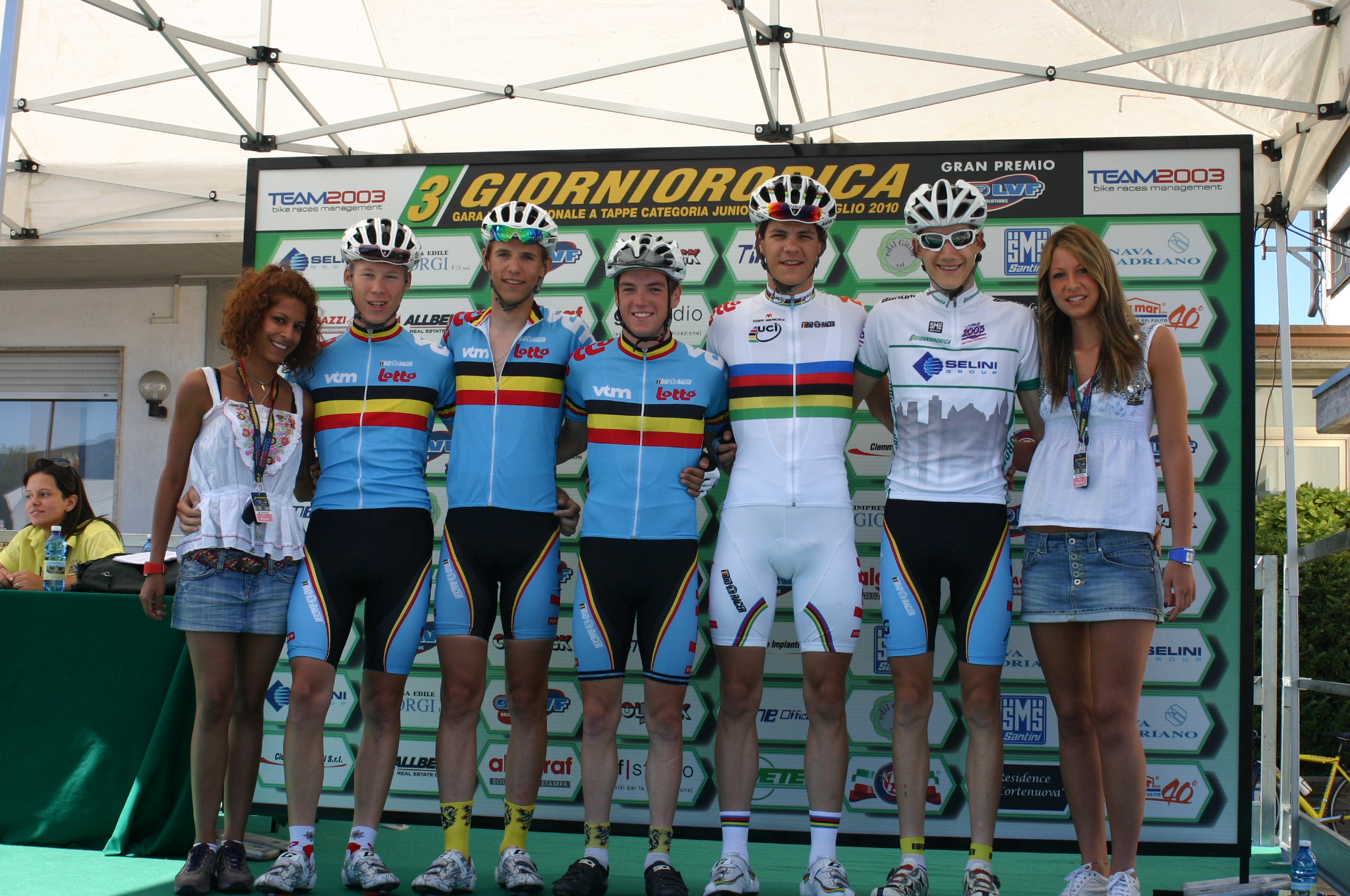 De Belgische nationale selectie junioren in 3 Giorni Orobica in 2010 met Emiel Wastyn en Jasper Stuyven.